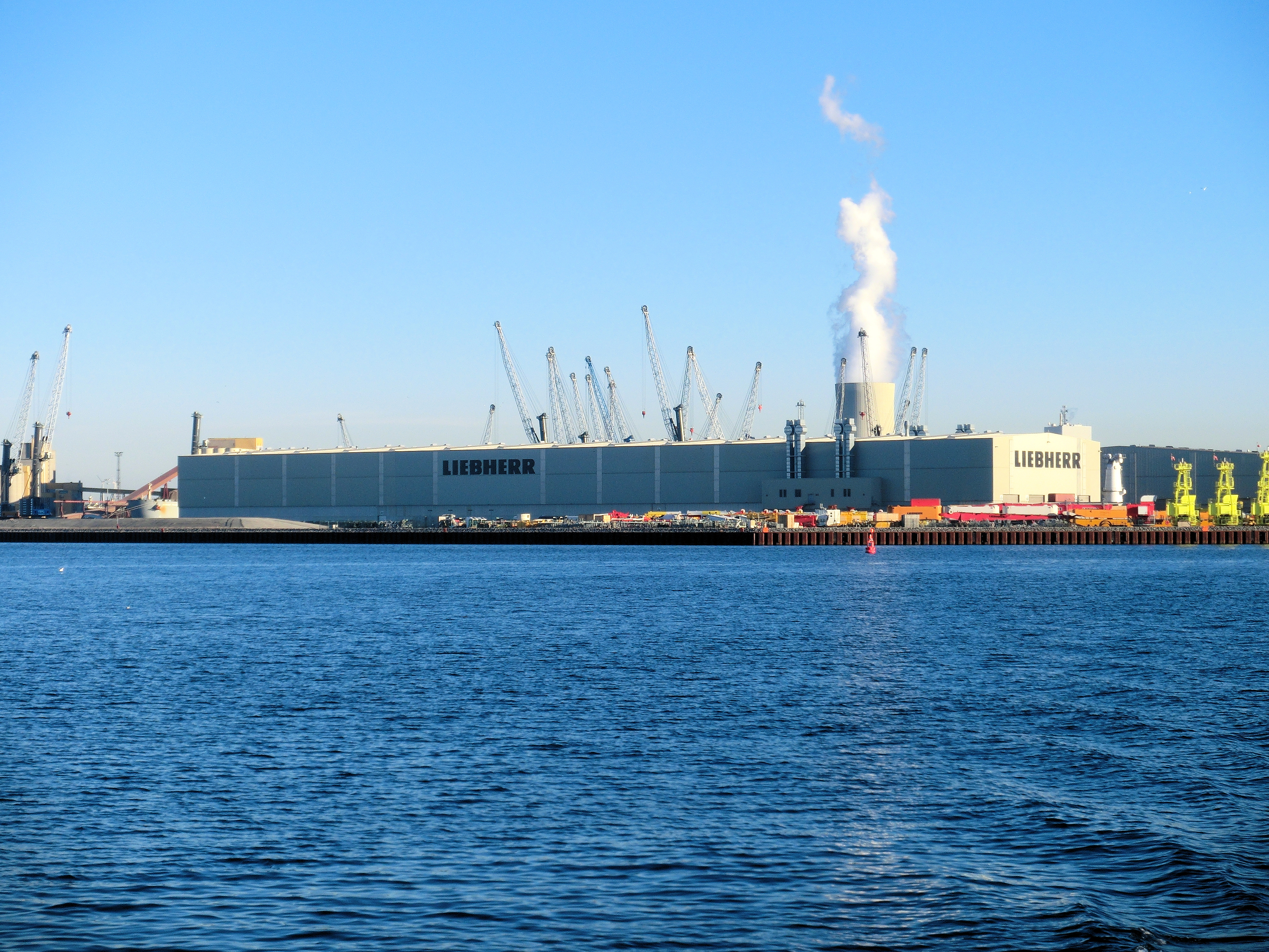 Rostock Liebherr Seehafen